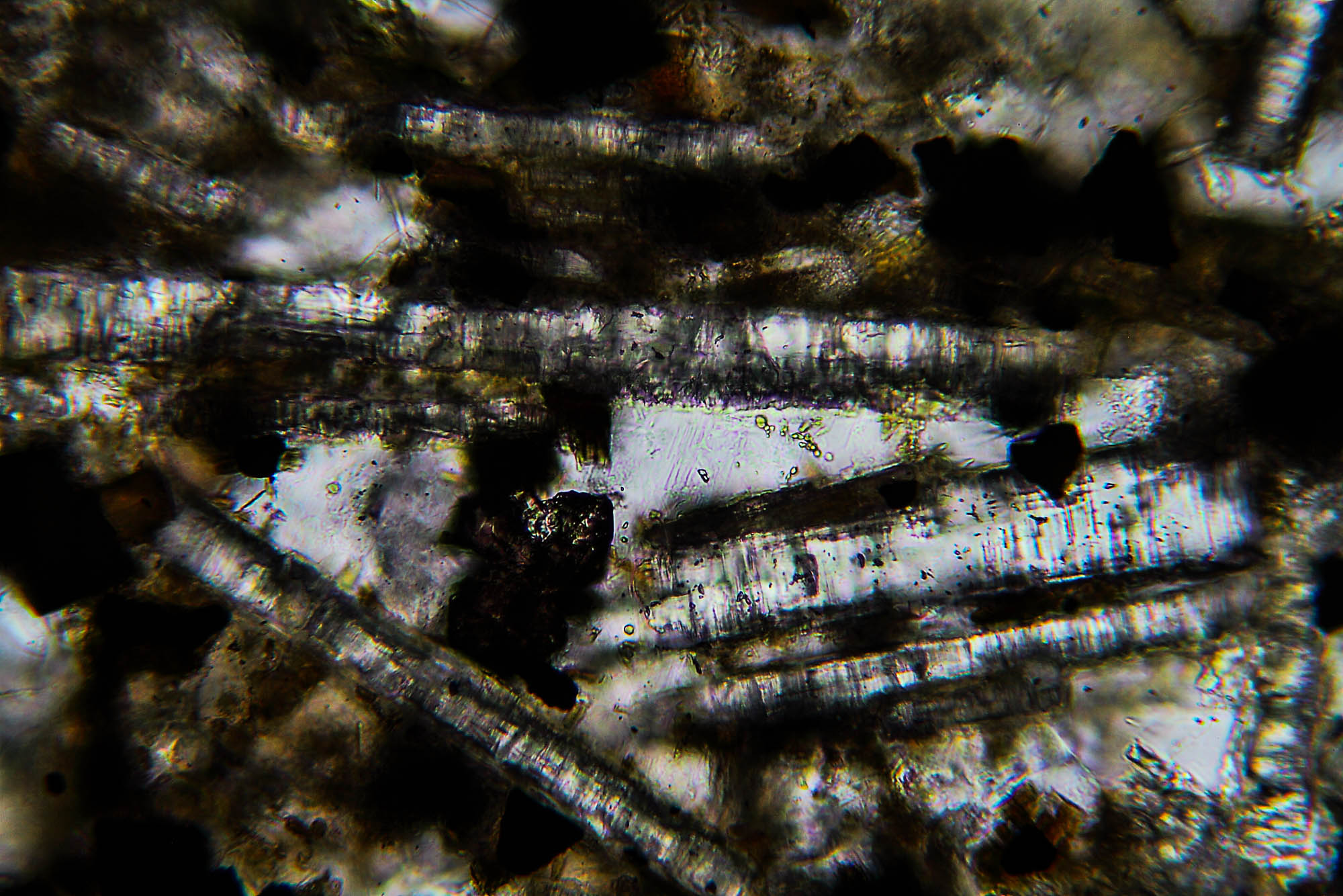 Melilith-Kristalle mit Umwandlungserscheinungen ("Pflockstruktur"). Bergalith vom Kaiserstuhl, Dünnschliff, LPL.